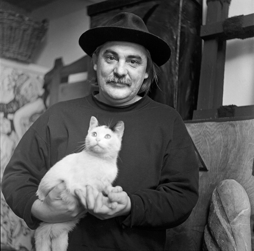 feLugossy László magyar festő, performer, színész, rendező, író, forgatókönyvíró, énekes.